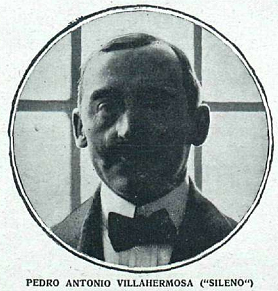 Retrato de Pedro Antonio Villahermosa «Sileno», en la revista española La Esfera.